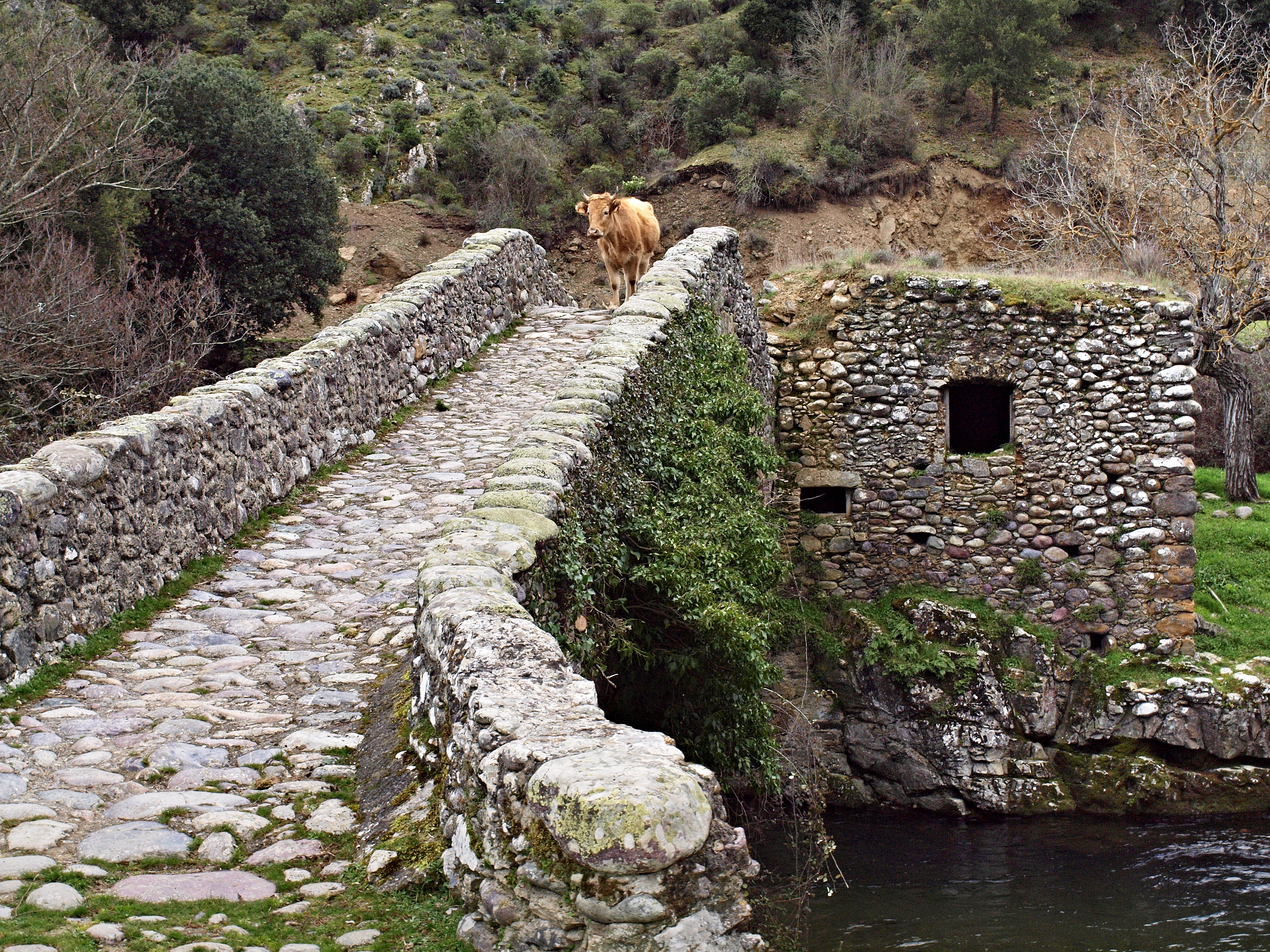 Castifao (Corsica) - Pont génois de Piana sur la Tartagine